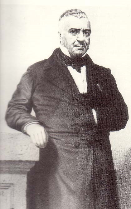 Louis David Guibal AnneVeaute, petit-fils d'Anne Veaute, industriel français